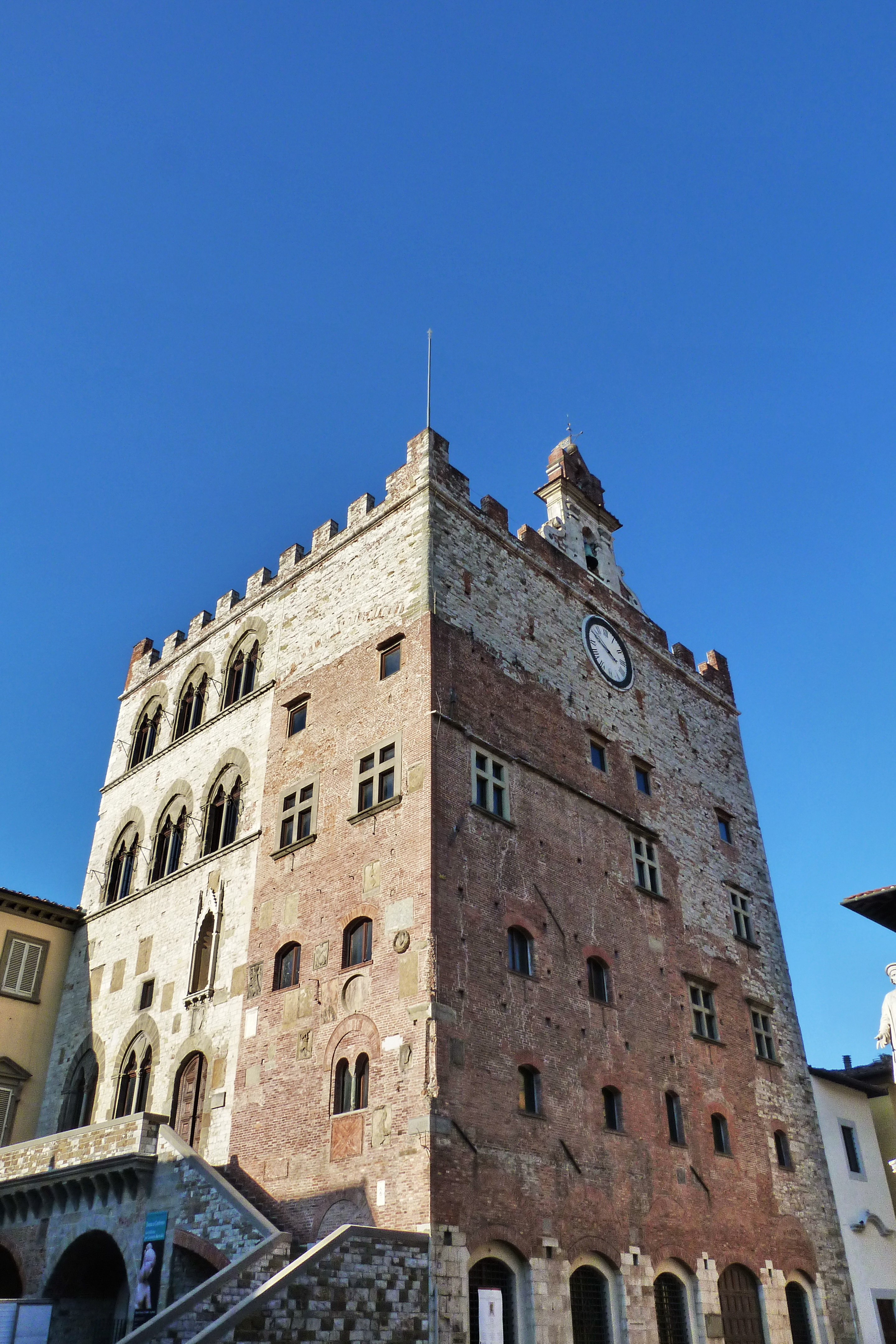 Palazzo Pretorio, Prato, Toscana, Italia This is a photo of a monument which is part of cultural heritage of Italy.